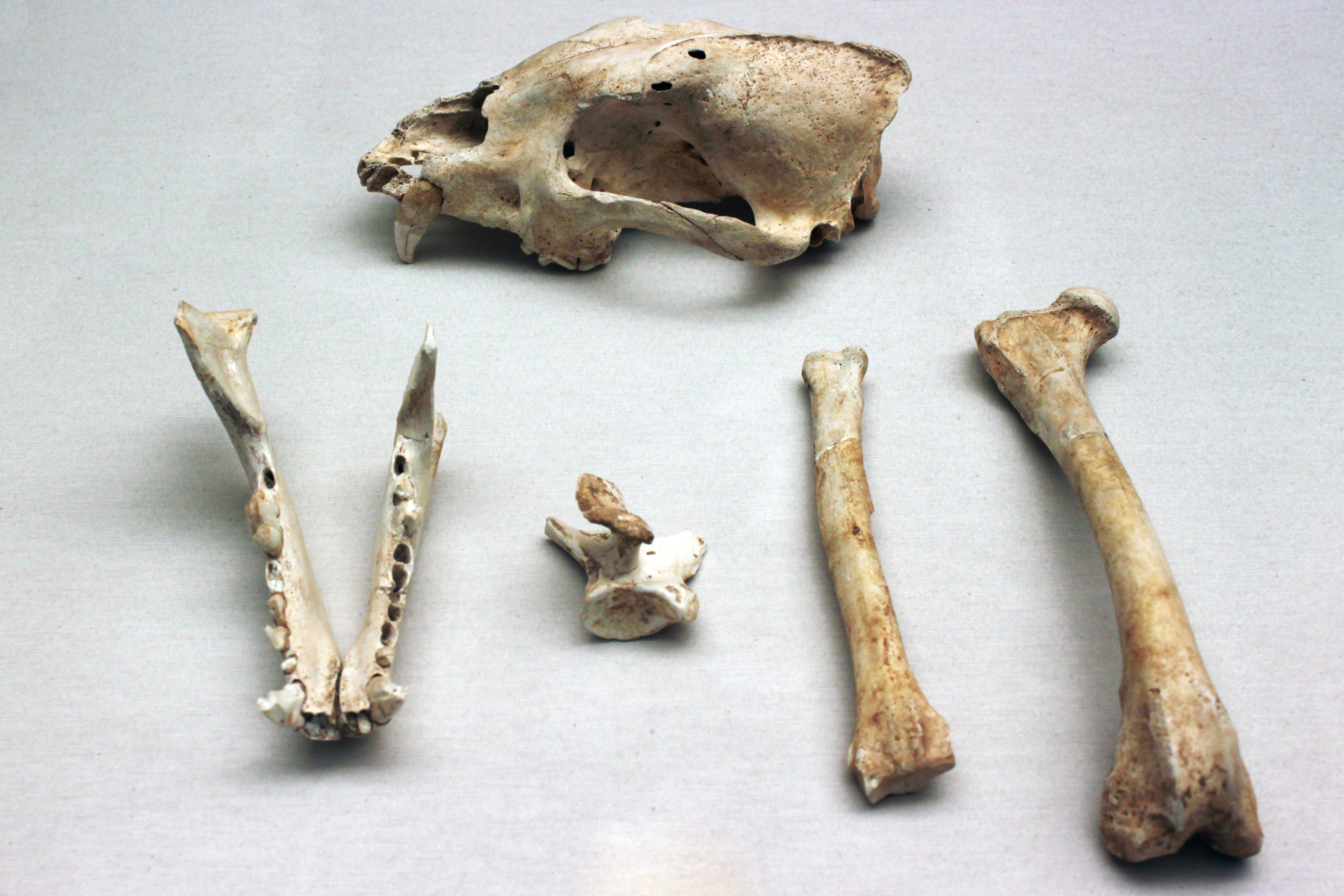 Restos fósiles de Cuon alpinus datados en el Würm superior de la Cova Negra de Játiva (Comunidad valenciana). Fondos del Museo de Prehistoria de Valencia, Comunidad valenciana, España.